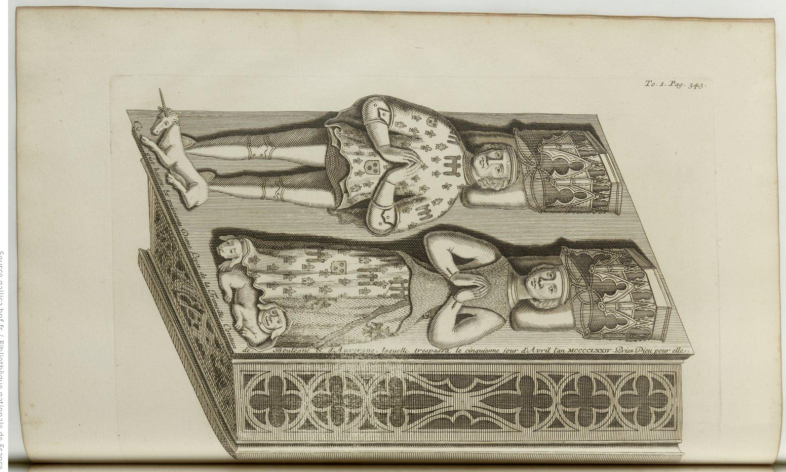 Tombeau de Bertrand VI d'Auvergne et de son épouse Louise de la Trémoille, dans l'abbaye du Bouschet.